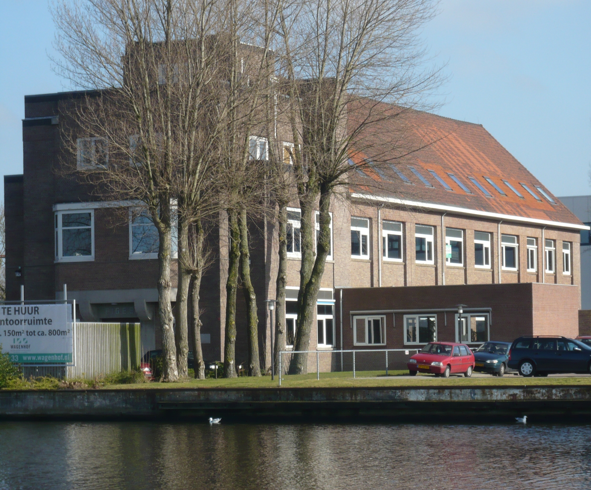 Voormalige kantoorgebouw Figee, Spaarne, Haarlem